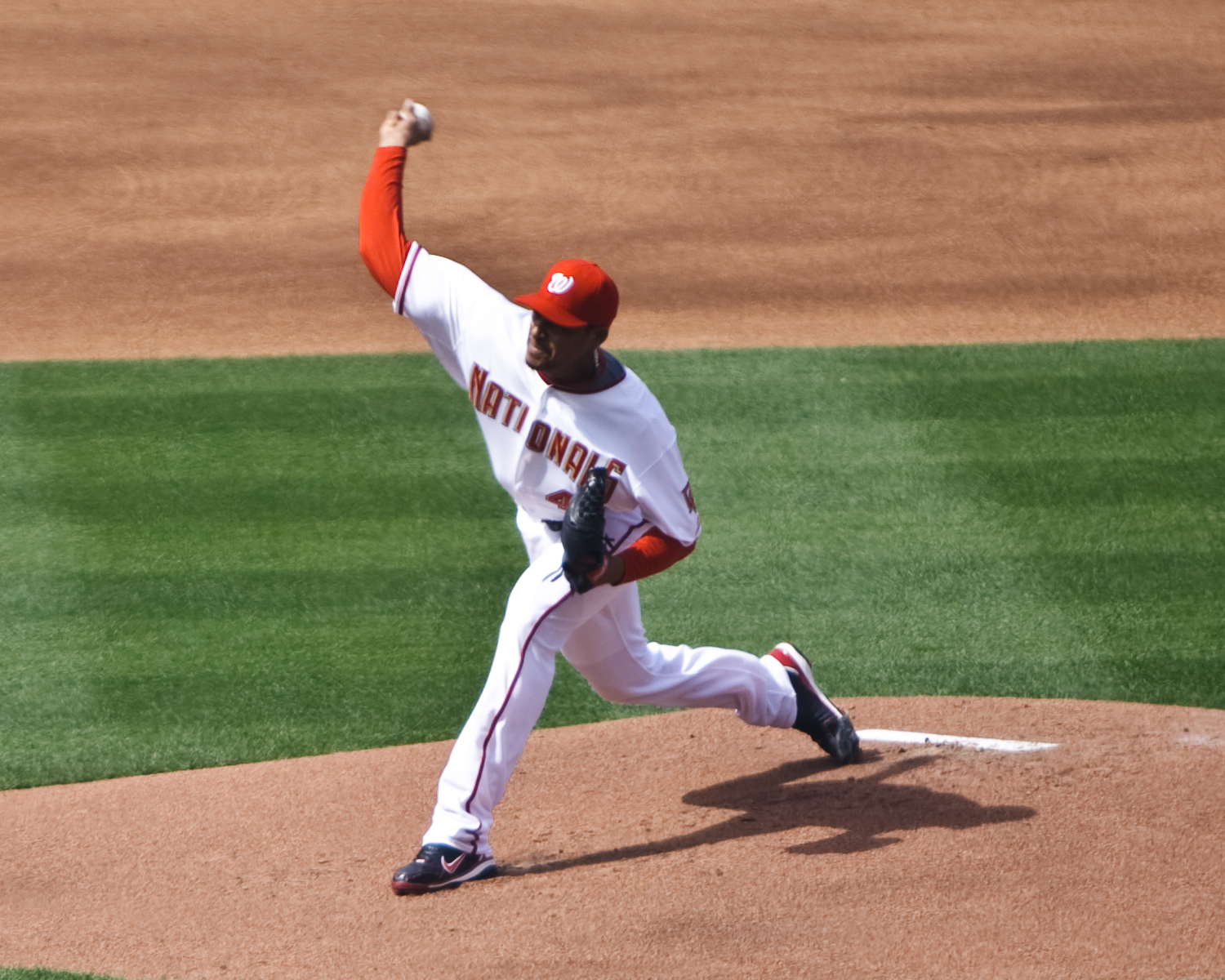 Daniel Cabrera